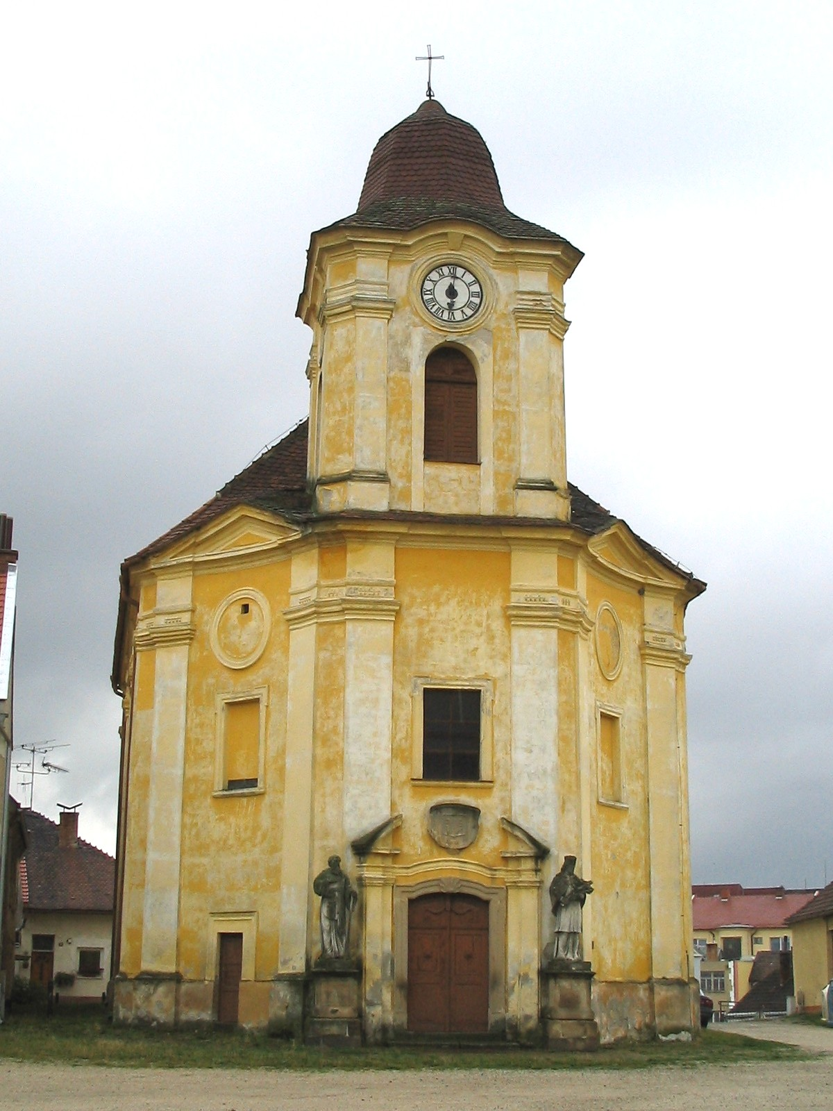 vlastní foto